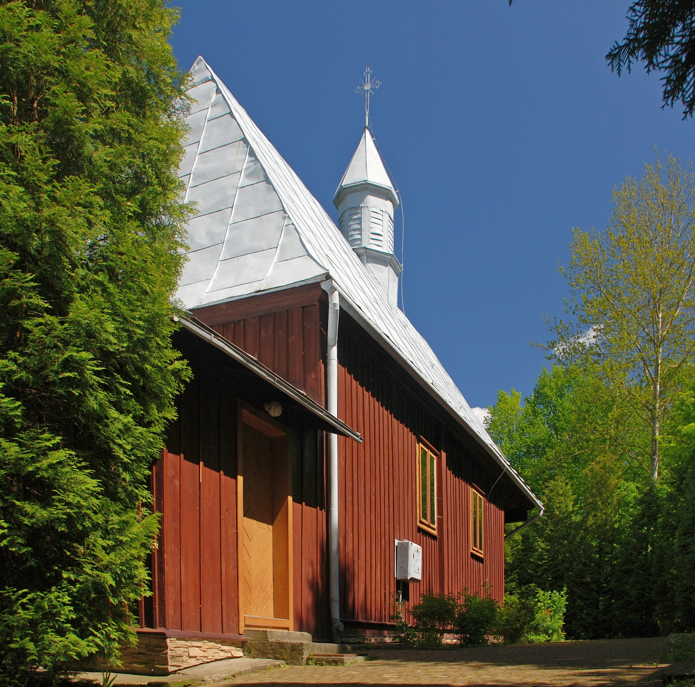 wieś Witryłów